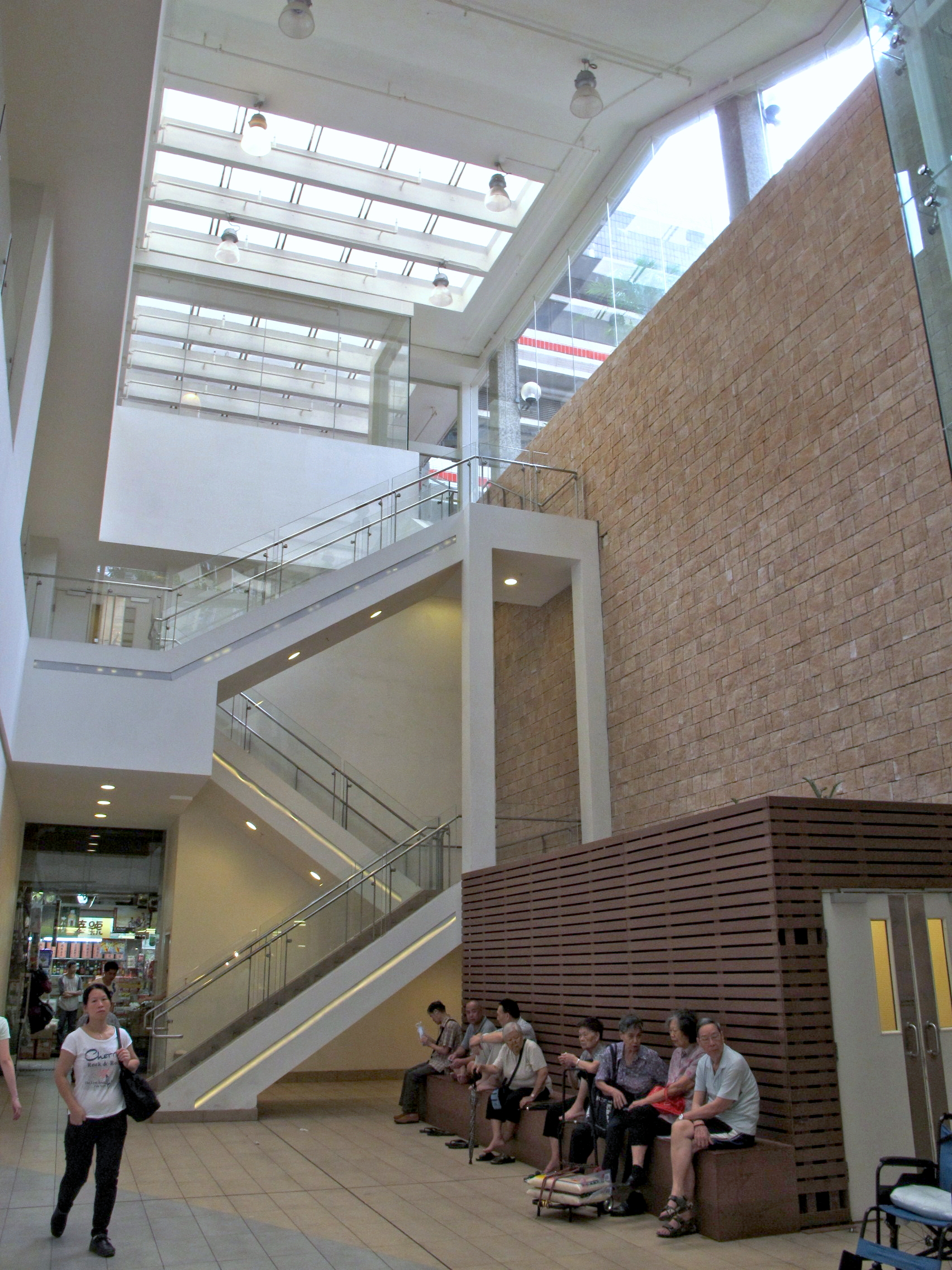 Cheung Fat Estate Shopping Fresh Market Void